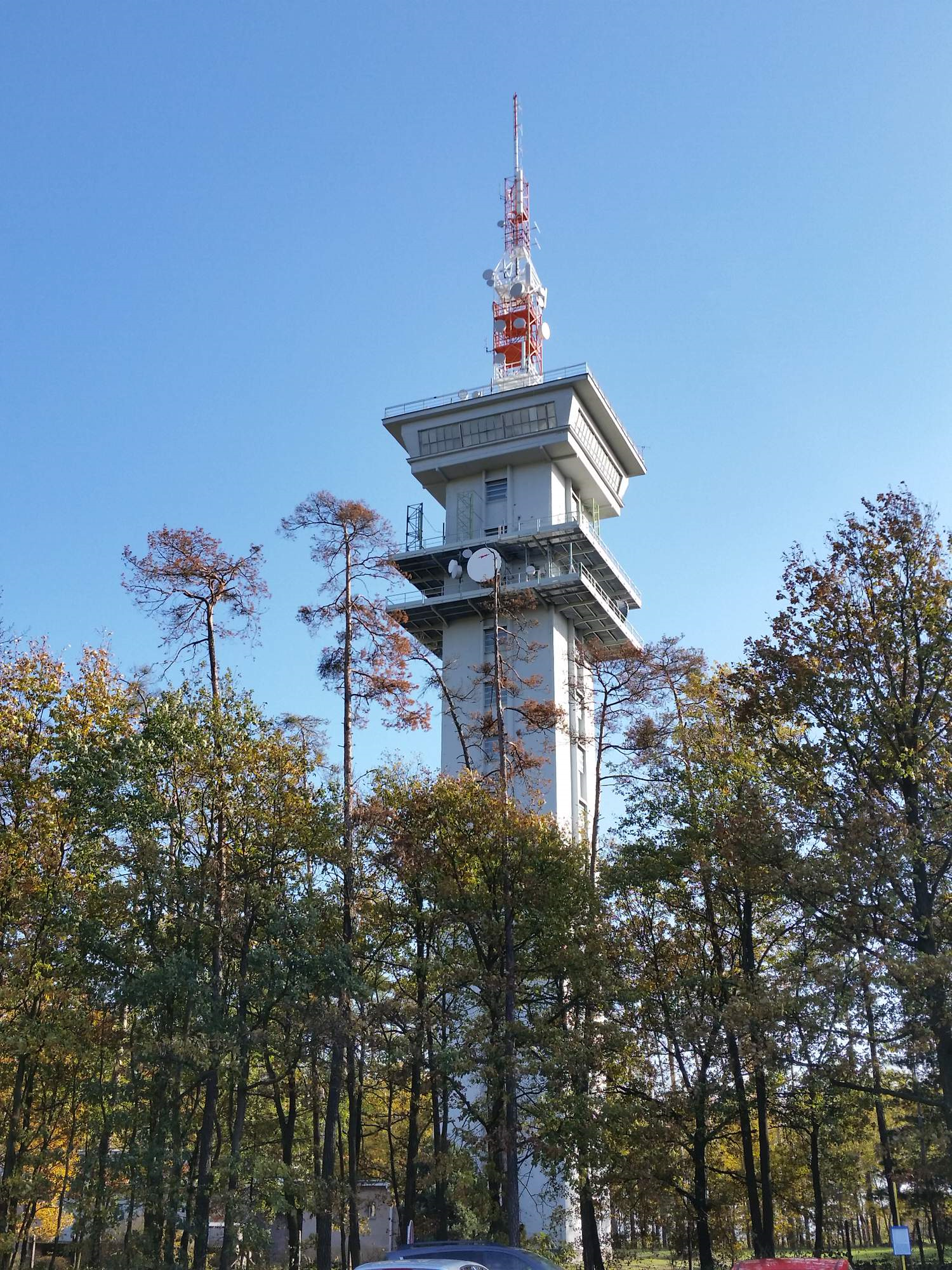 Vysílač Hoděšovice